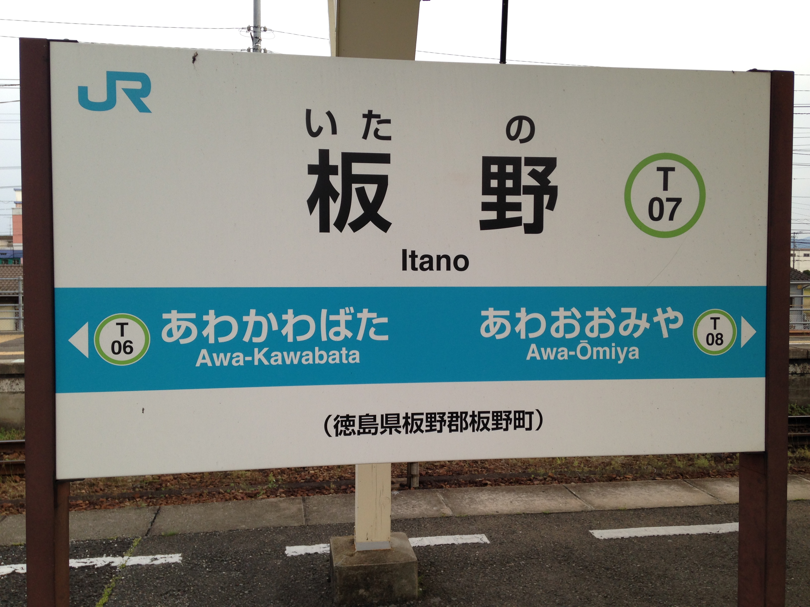 板野駅の駅名標